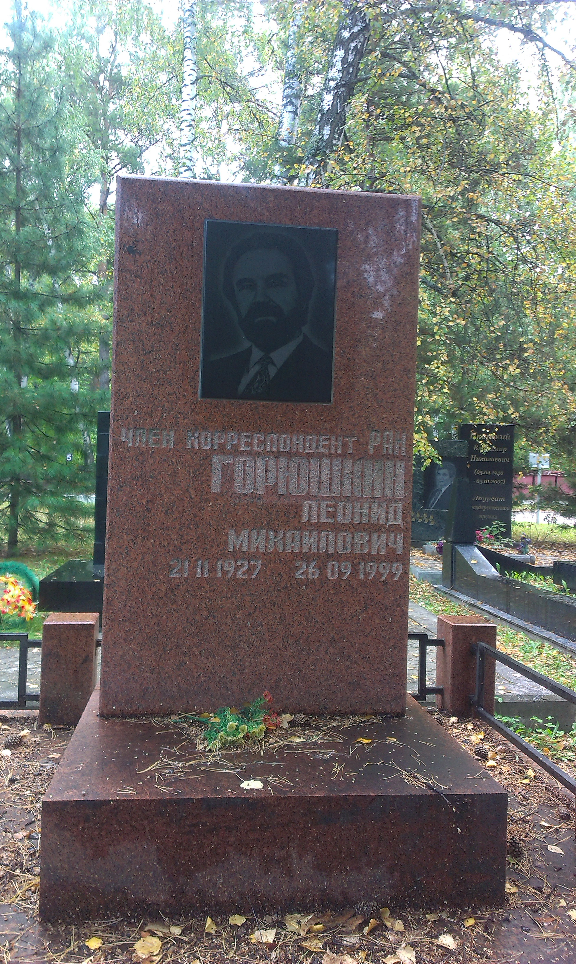 Южное (Чербузинское) кладбище